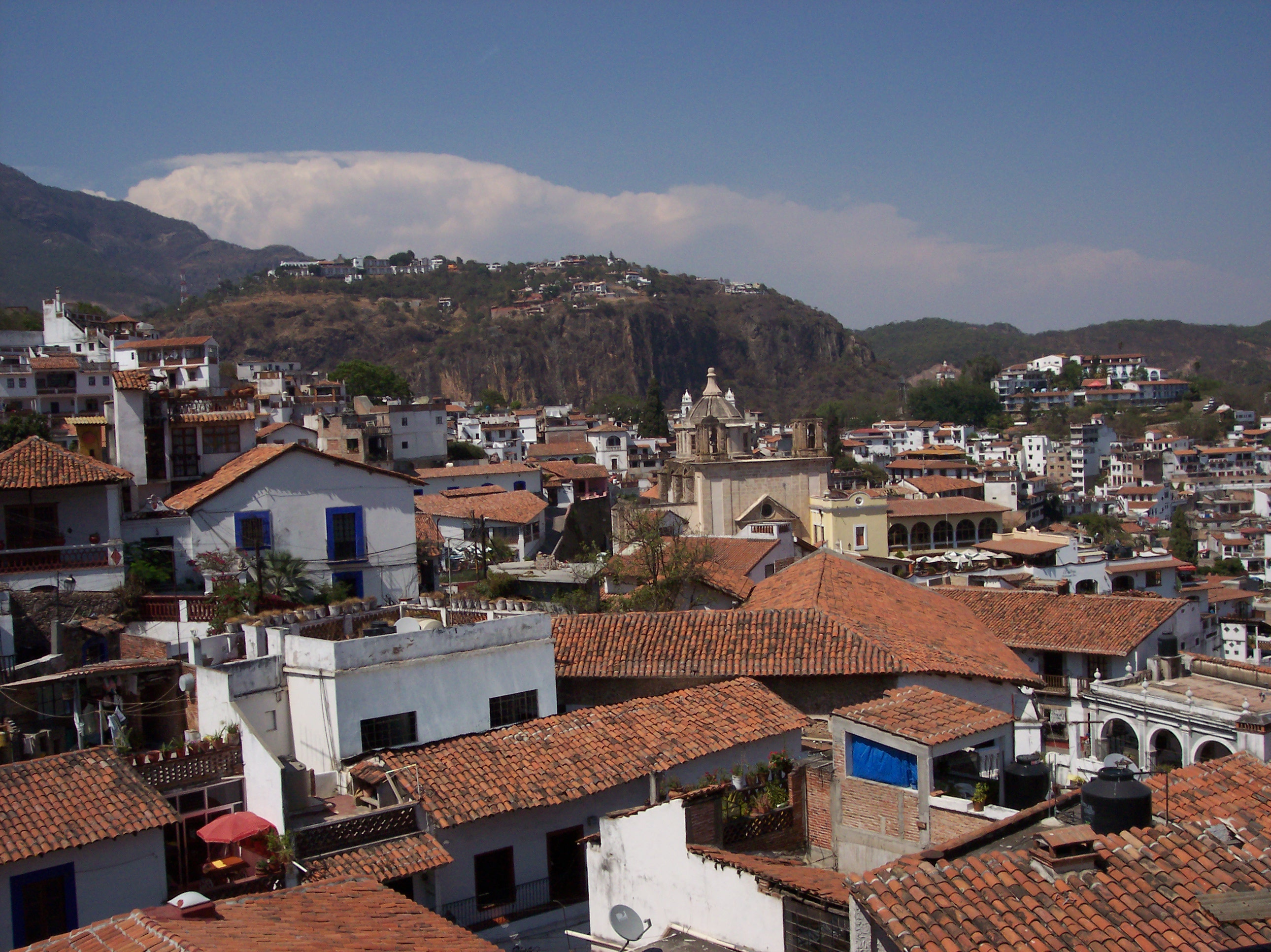 Rear view from the fourth floor of the Culture House in the Borda Park (central park) SPANISH: Vista trasera desde el cuarto piso de la Casa de la Cultura ubicada en la Plaza Borda (parque central) Photo taken in Taxco de Alarcón Municipality, State of Guerrero, Mexico. SPANISH: Foto tomada en el municipio de Taxco de Alarcón, Estado de Guerrero, Mexico.